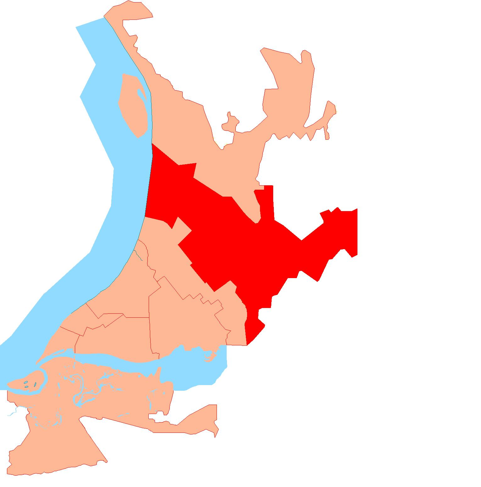 Samara district